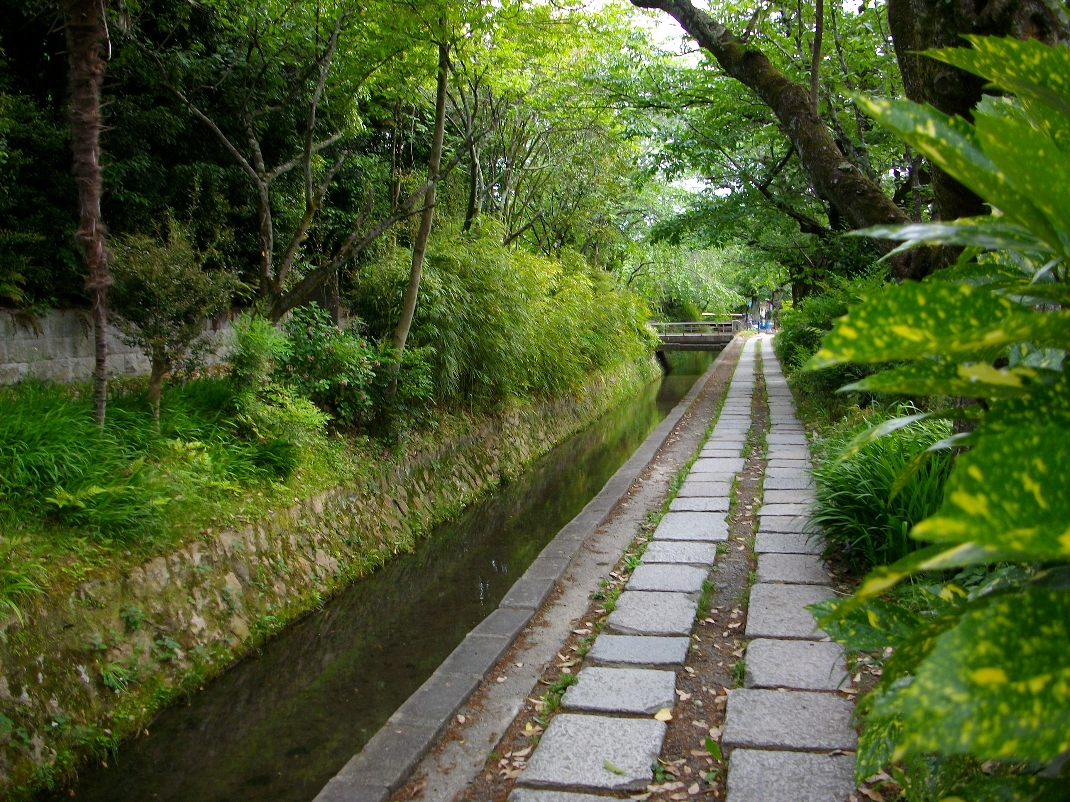 新型コロナウイルスによる外出自粛要請で誰もいない状態の哲学の道。余程の悪天候でもないかぎり、深夜でも誰かしら歩いているので、京都に生まれ育ちこうした状況を見たのは初めて。